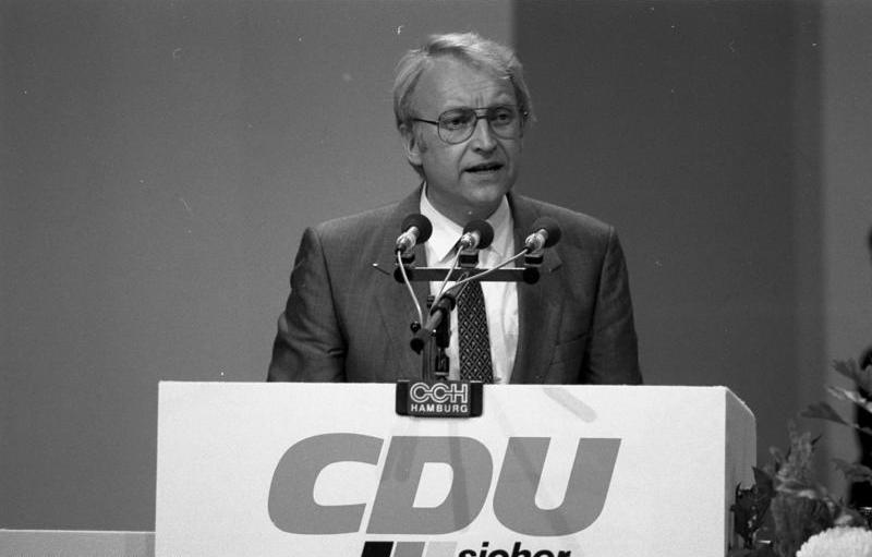 2.-5.11.1981 30. Bundesparteitag der CDU in Hamburg im Congress Centrum